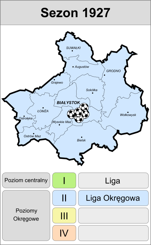 Kluby sportowe w lidze okręgowej 1927 rok.